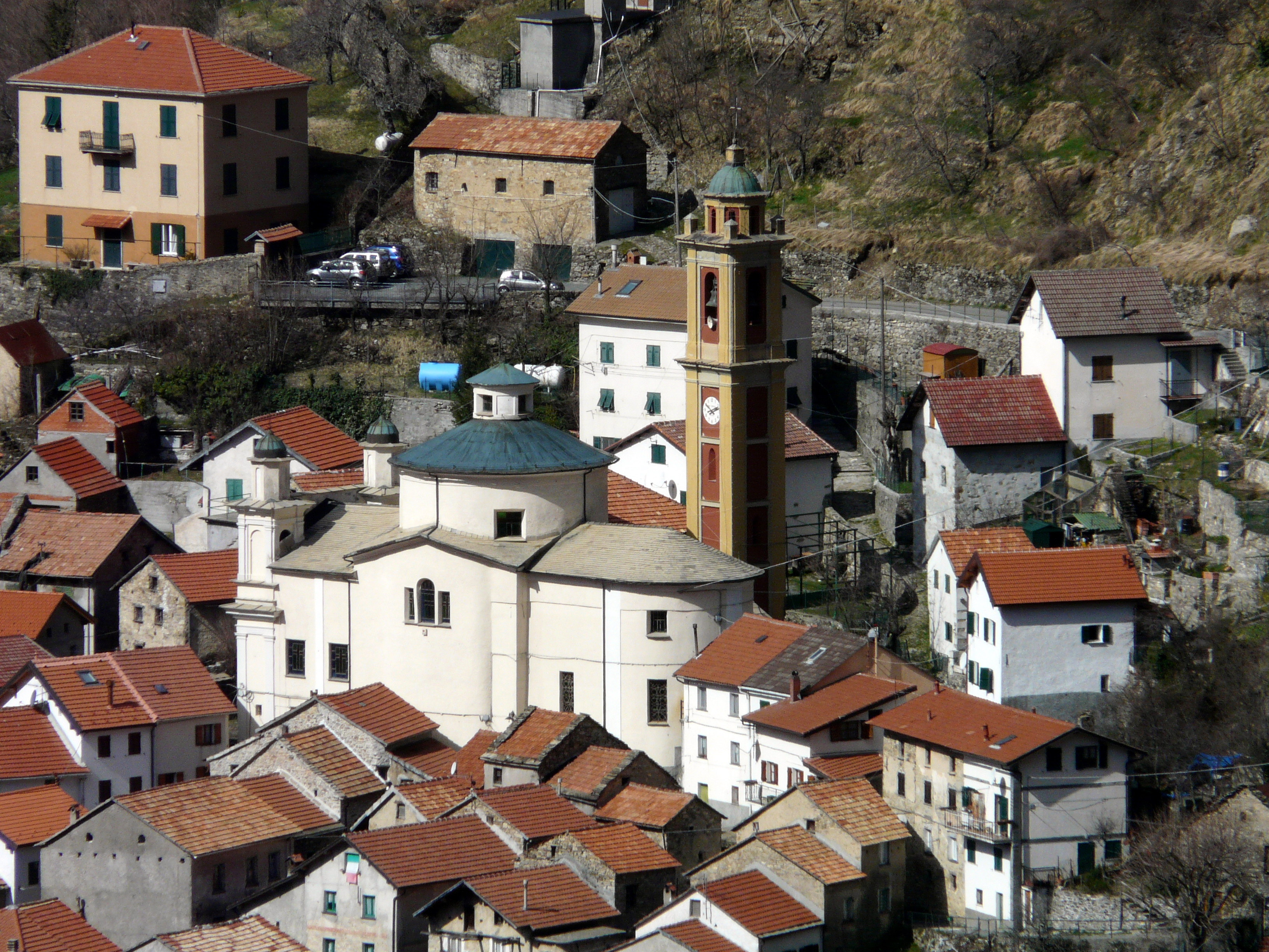 Chiesa di San Pietro Apostolo, Pentema, Torriglia, Liguria, Italia